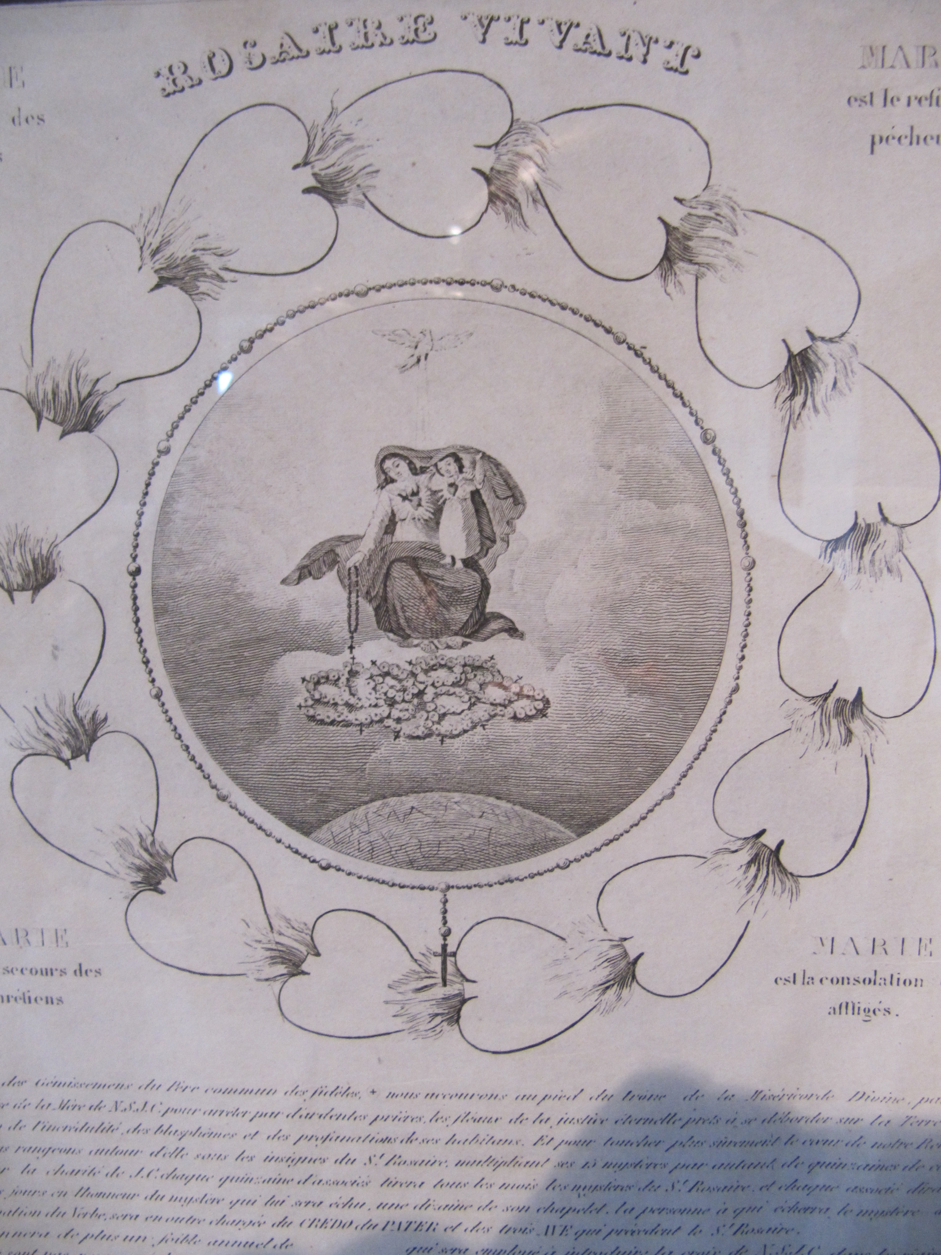 Газета "Rosaire Vivant", издаваемая Паулиной Жарико, дом-музей "Дом Паулины Жарико", Лион, Франция